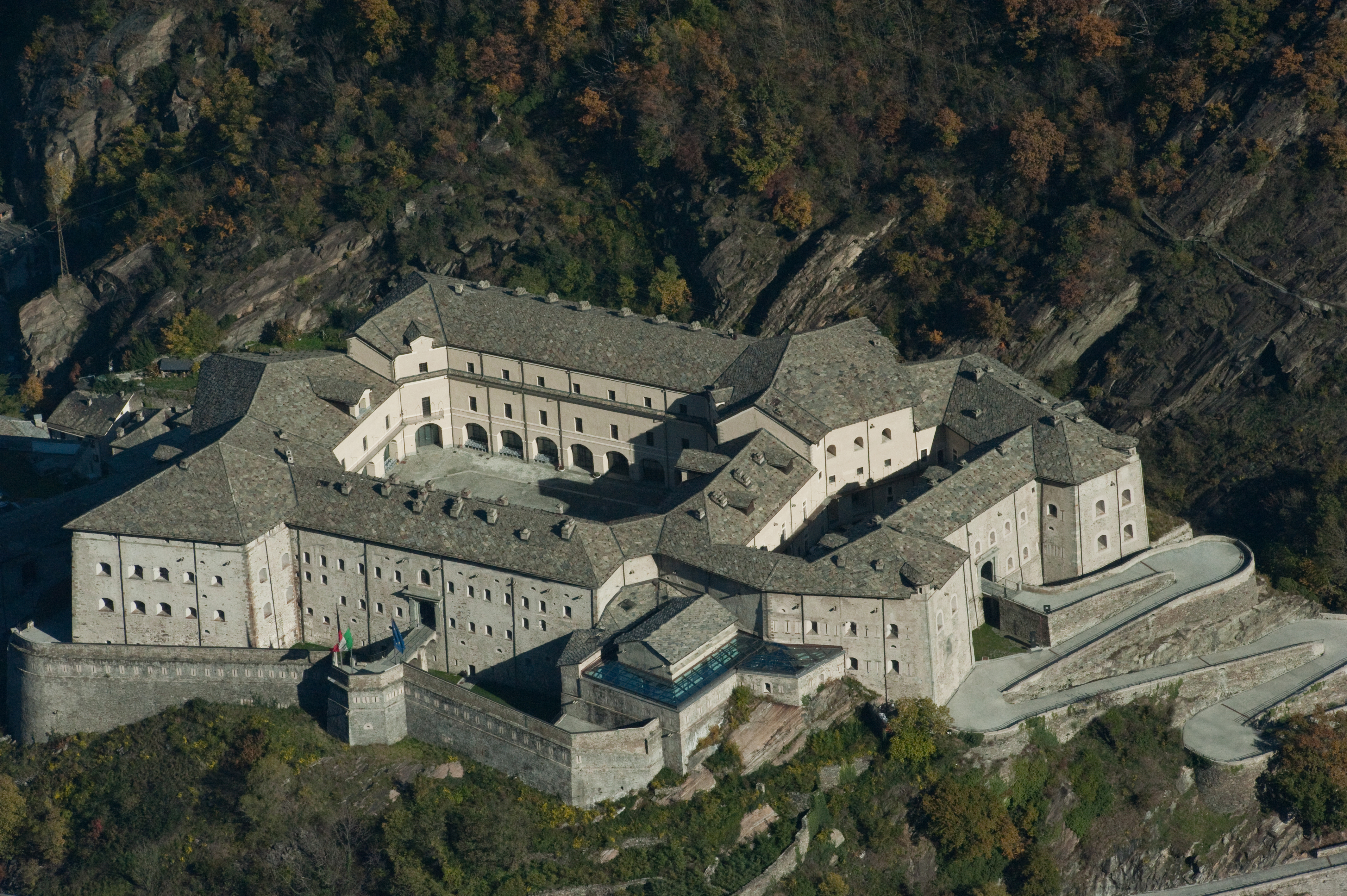 Forte di Bard. E' uno dei migliori esempi di fortezza di sbarramento di primo Ottocento. E' costituito da tre principali corpi di fabbrica, posti a diversi livelli. Nel 2006 è stato aperto al pubblico dopo una monumentale opera di ristrutturazione This is a photo of a monument which is part of cultural heritage of Italy.